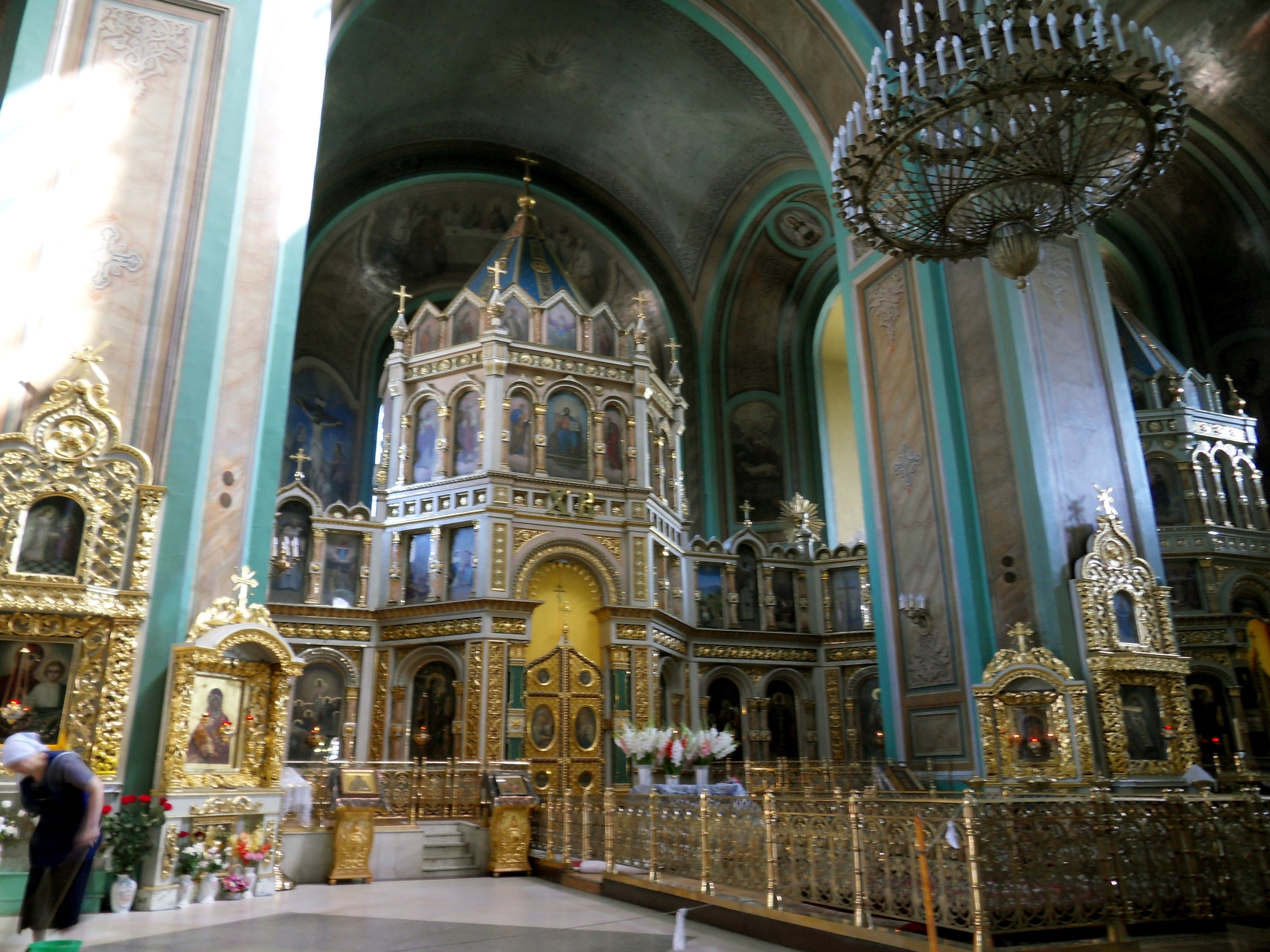 W kafedralnej cerkwi